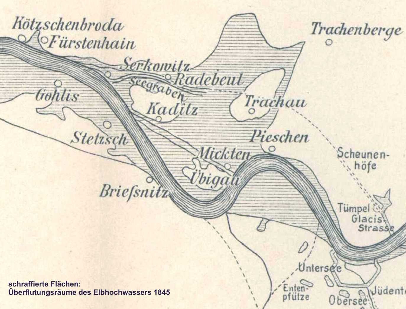 Detail einer Karte zur geologischen Situation des Elbtales zwischen Dresden und Radebeul